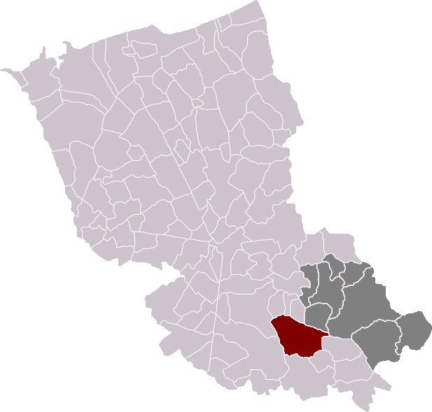 Locatie gemeente Oud-Berkijn in arrondissement Duinkerke. Zelfgemaakt. Location of Vieux-Berquin municipality in the arrondissement of Dunkirk. Self made. Localisation de la commune de Vieux-Berquin dans l'arrondissement de Dunkerque. Fait moi-même.